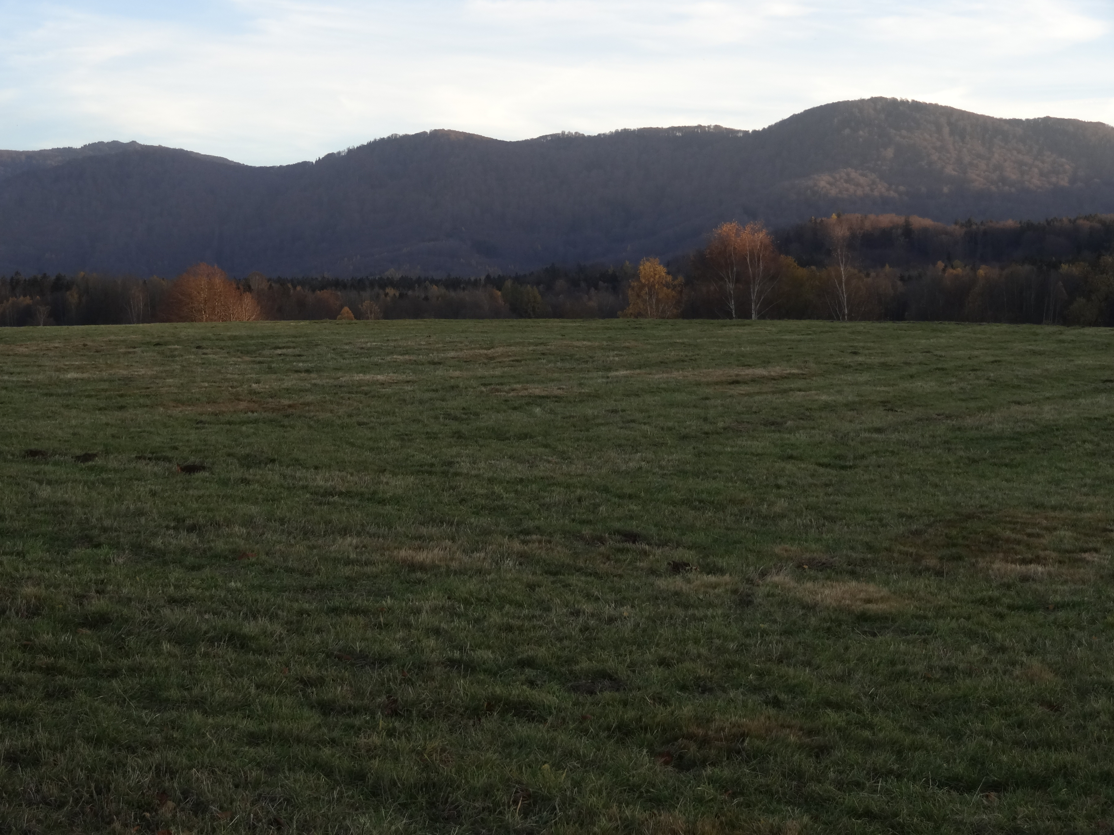 Poledník (864 m, bývalá NPR, dnes součást NPR Jizerskohorské bučiny) od samoty Dvořákov u Raspenavy